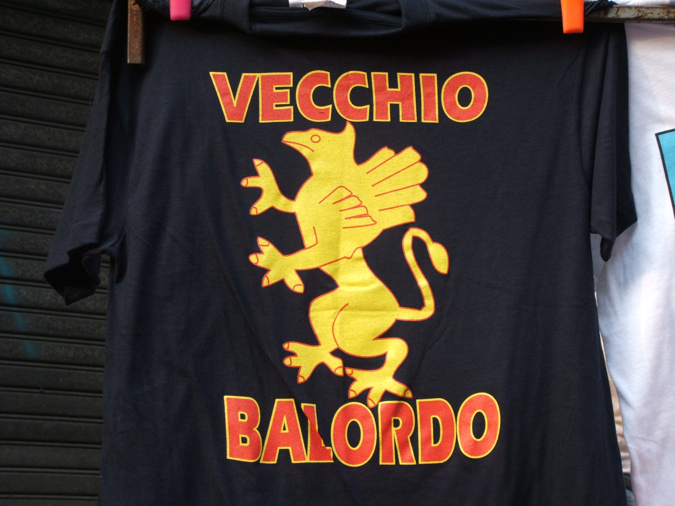 Genova, festeggiamenti per la promozione del Genoa CFC in Serie A